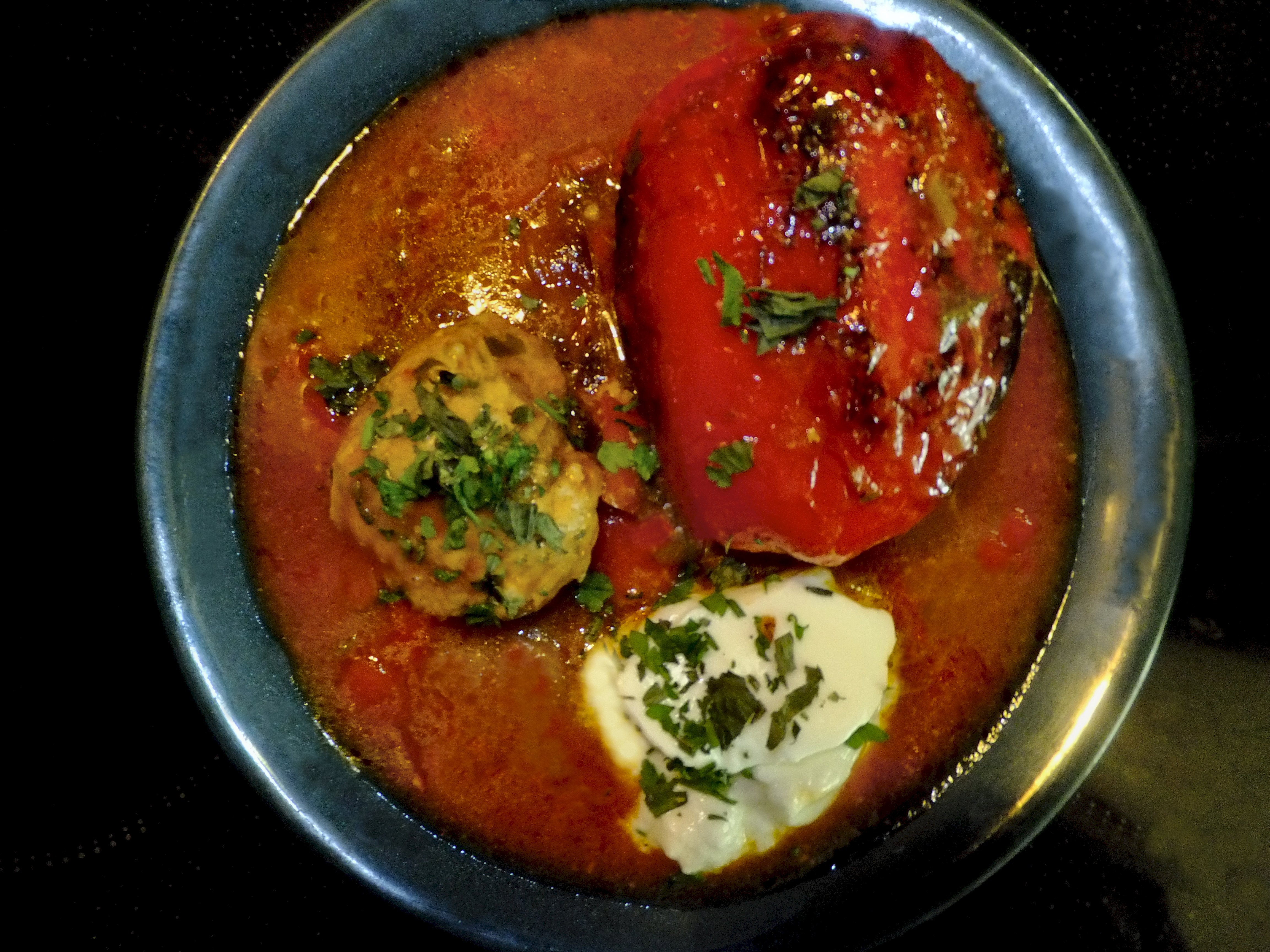 Ardei umplut - meat stuffed pepper – gefüllte Paprika